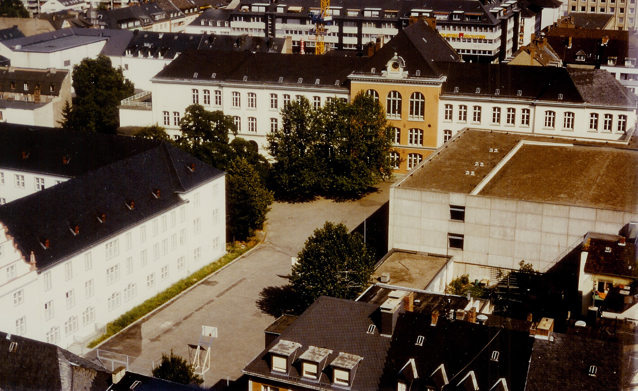 Fotografie des Görres-Gymnasiums Koblenz, entstanden zwischen 1981 und 1986, aufgenommen vom GEWA-Hochhaus - eher nach 1986, wegen des schon renovierten Gebäudes des Jesuitenkollegs